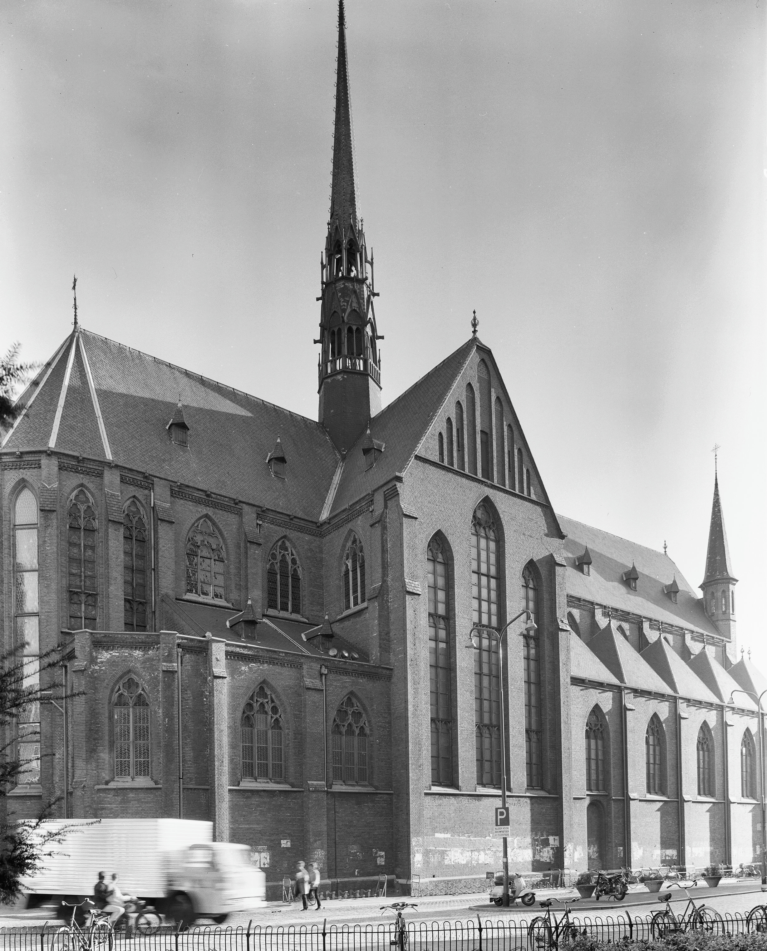 De Martinuskerk aan de Broerstraat in Groningen, exterieur noordzijde, 1969